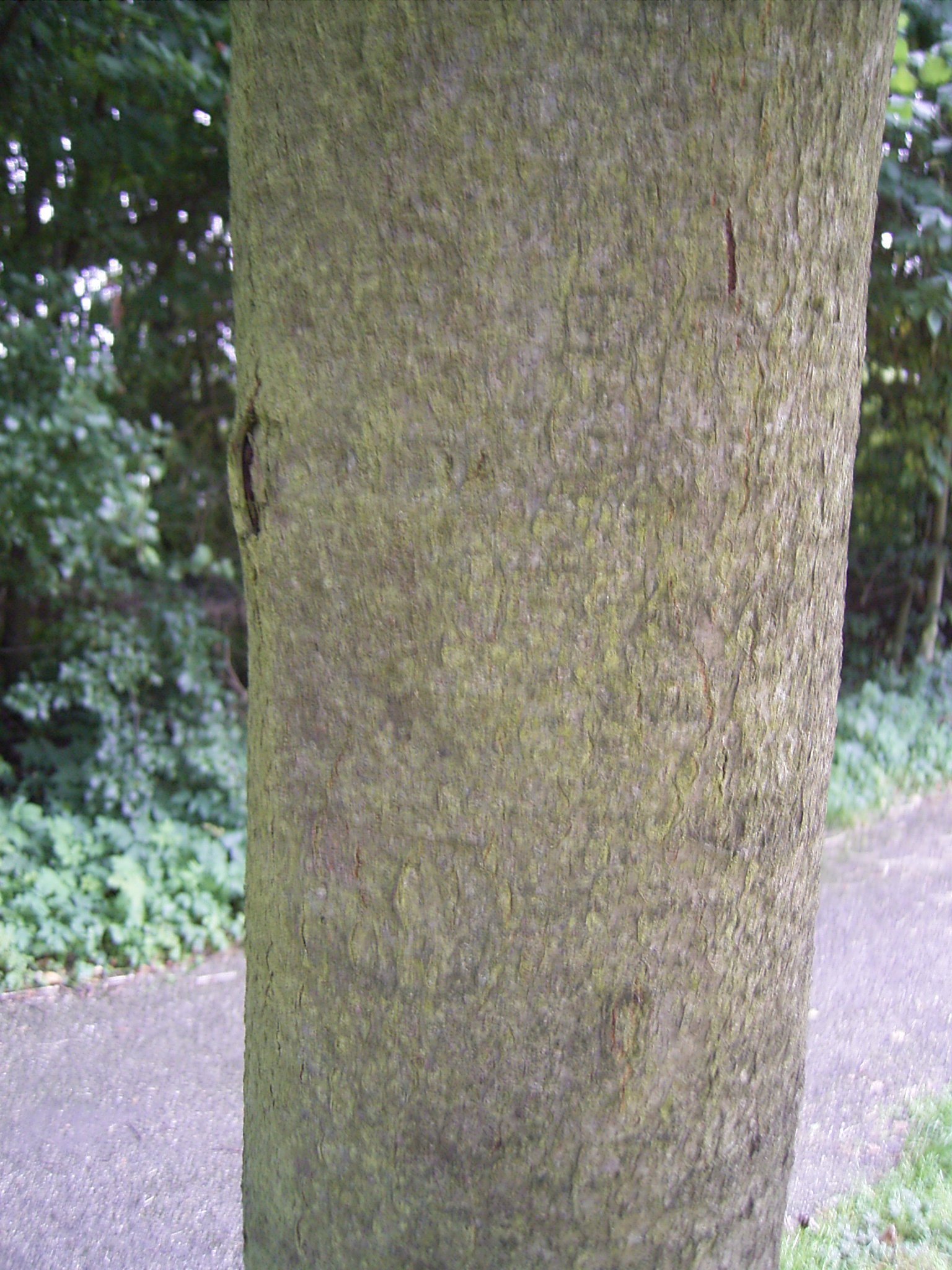 Deze foto toont stam van de Zweedse lijsterbes. Ik nam de foto vandaag op landgoed te Werve in Rijswijk. This photo shows Sorbus intermedia. I took this photo today in Rijswijk, Netherlands.